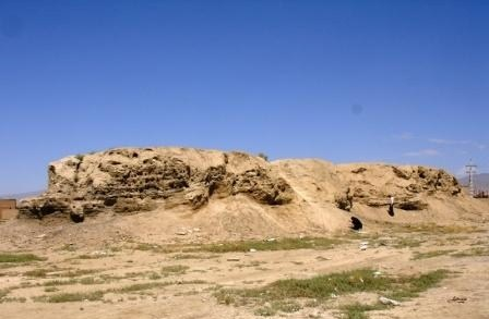 kultepe